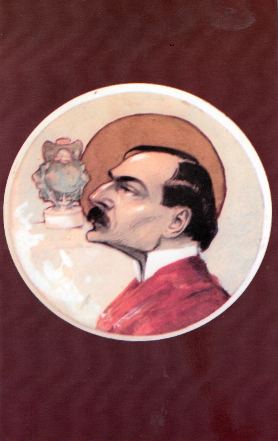 Autoportret Sfântul, în planul al doilea este statuia lui Constantin I. Stăncescu în chip de brotăcel.